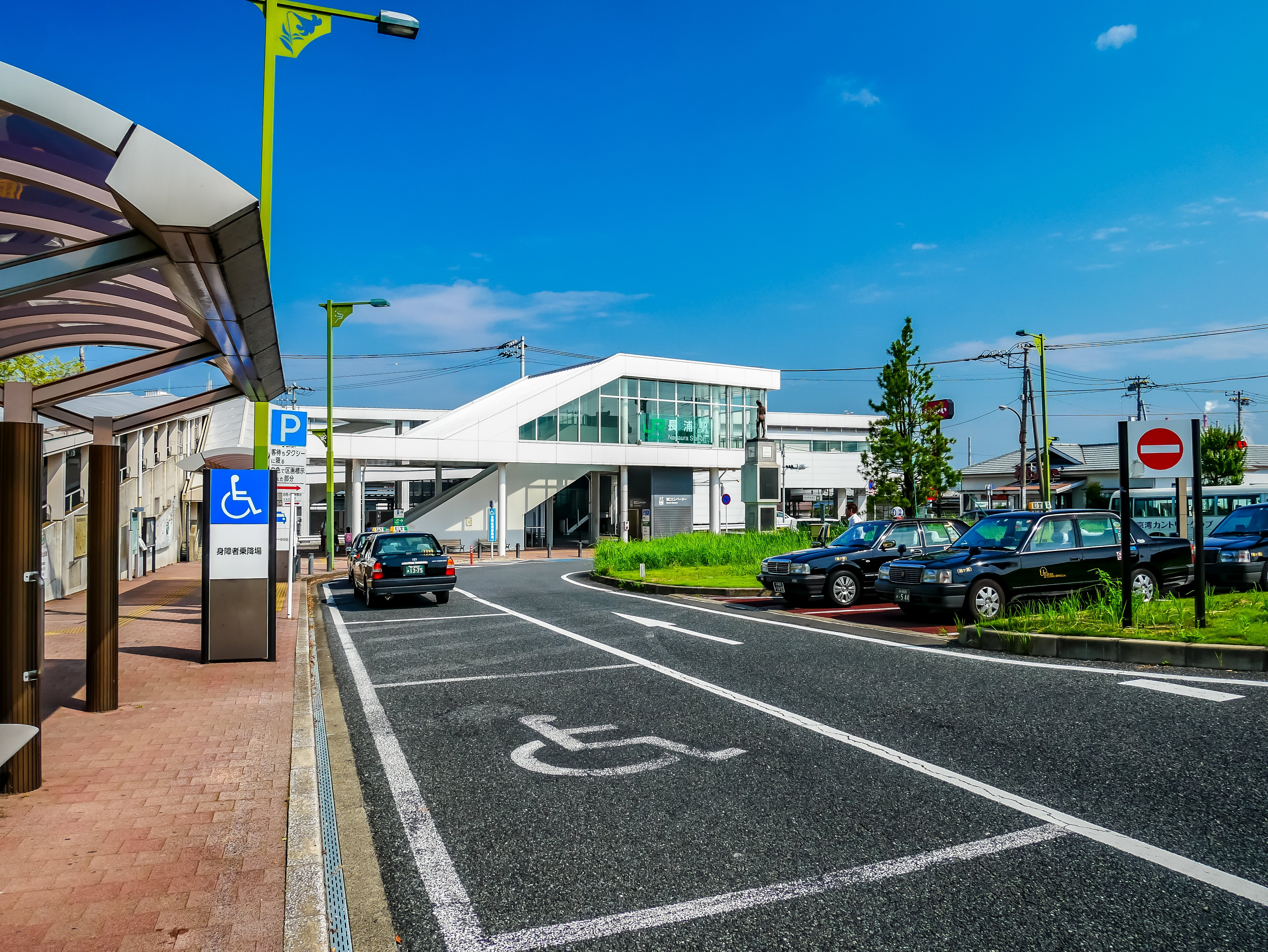 千葉県袖ケ浦市、長浦駅、内房線 Panasonic Lumix DMC-GX7 Mark II